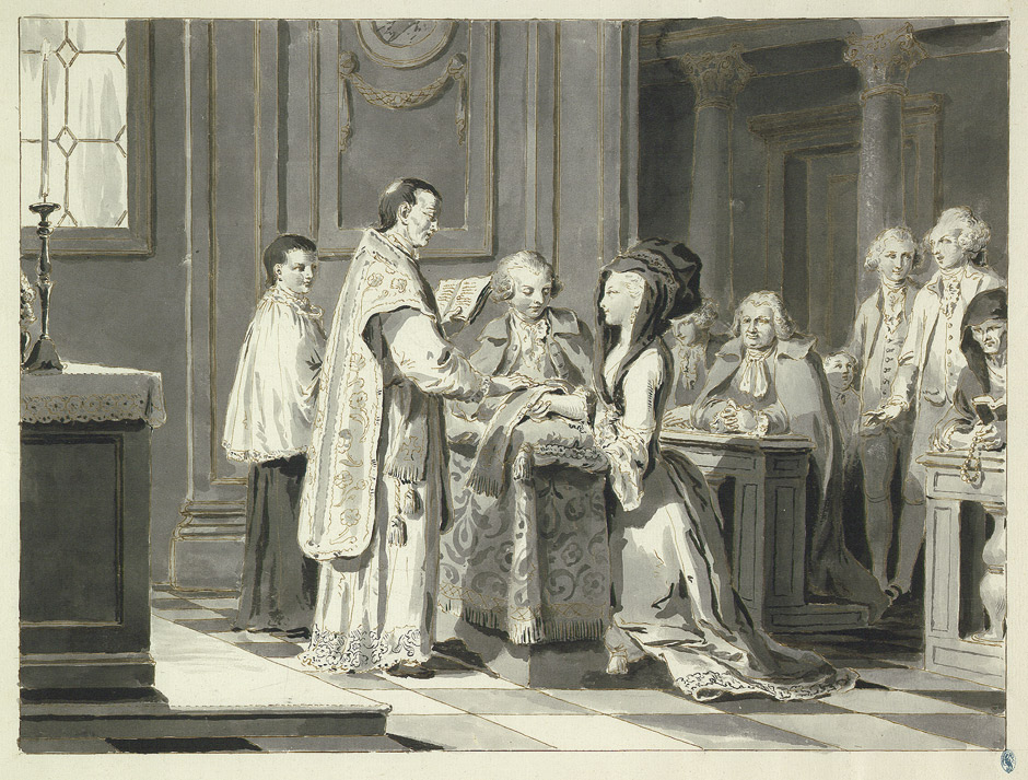 Ehe, aus einer Serie der sieben Sakramente: Federzeichnung, ca. 38,5 x 52,5 cm; hergestellt im Auftrag von Padre Ghedini